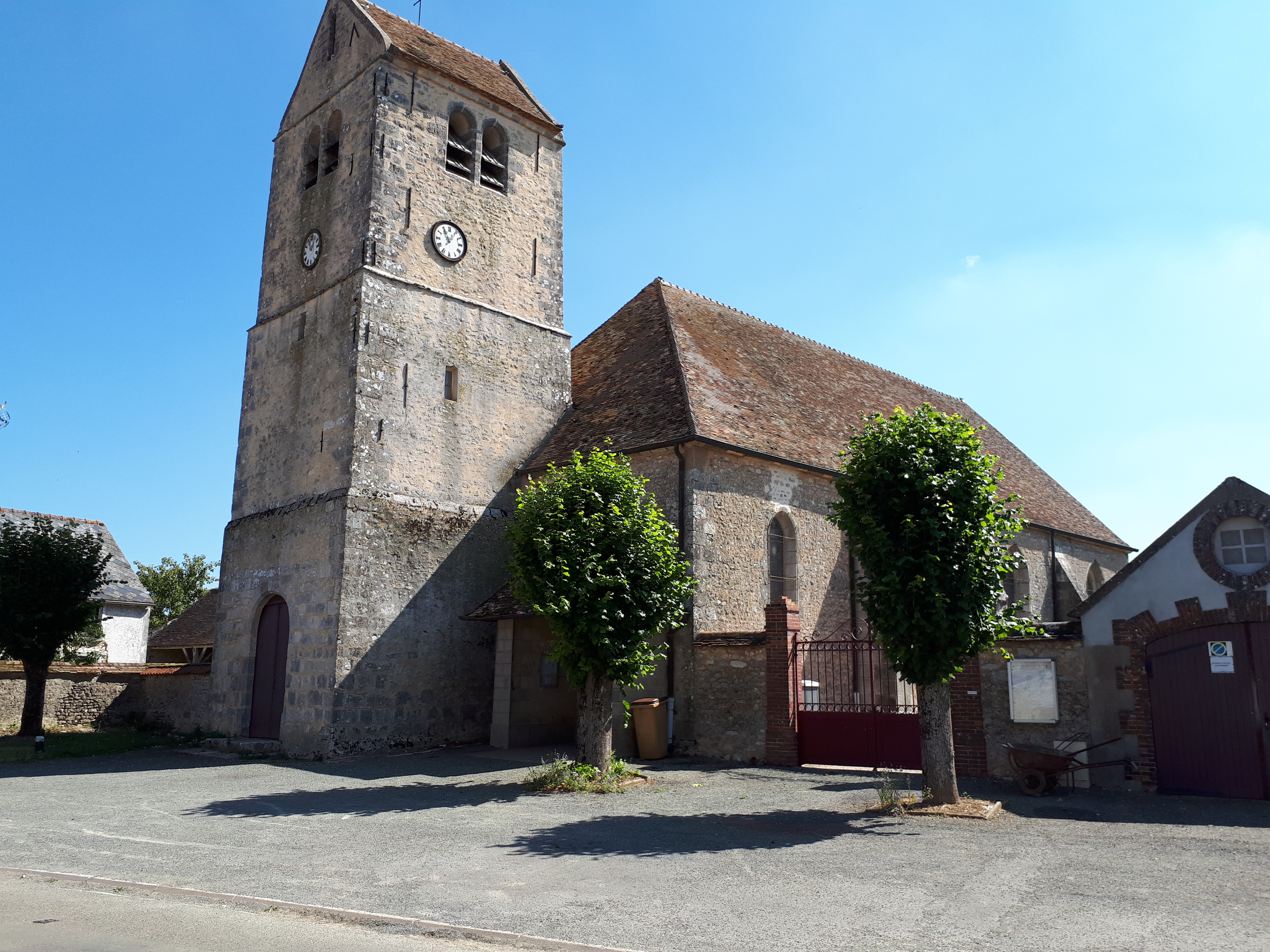 Église de Châtenay (Eure-et-Loir).